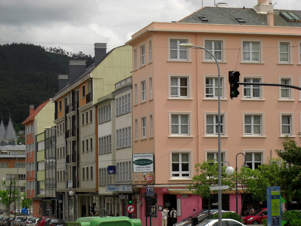 Barrio de Xuvia, en la zona urbana de Narón.